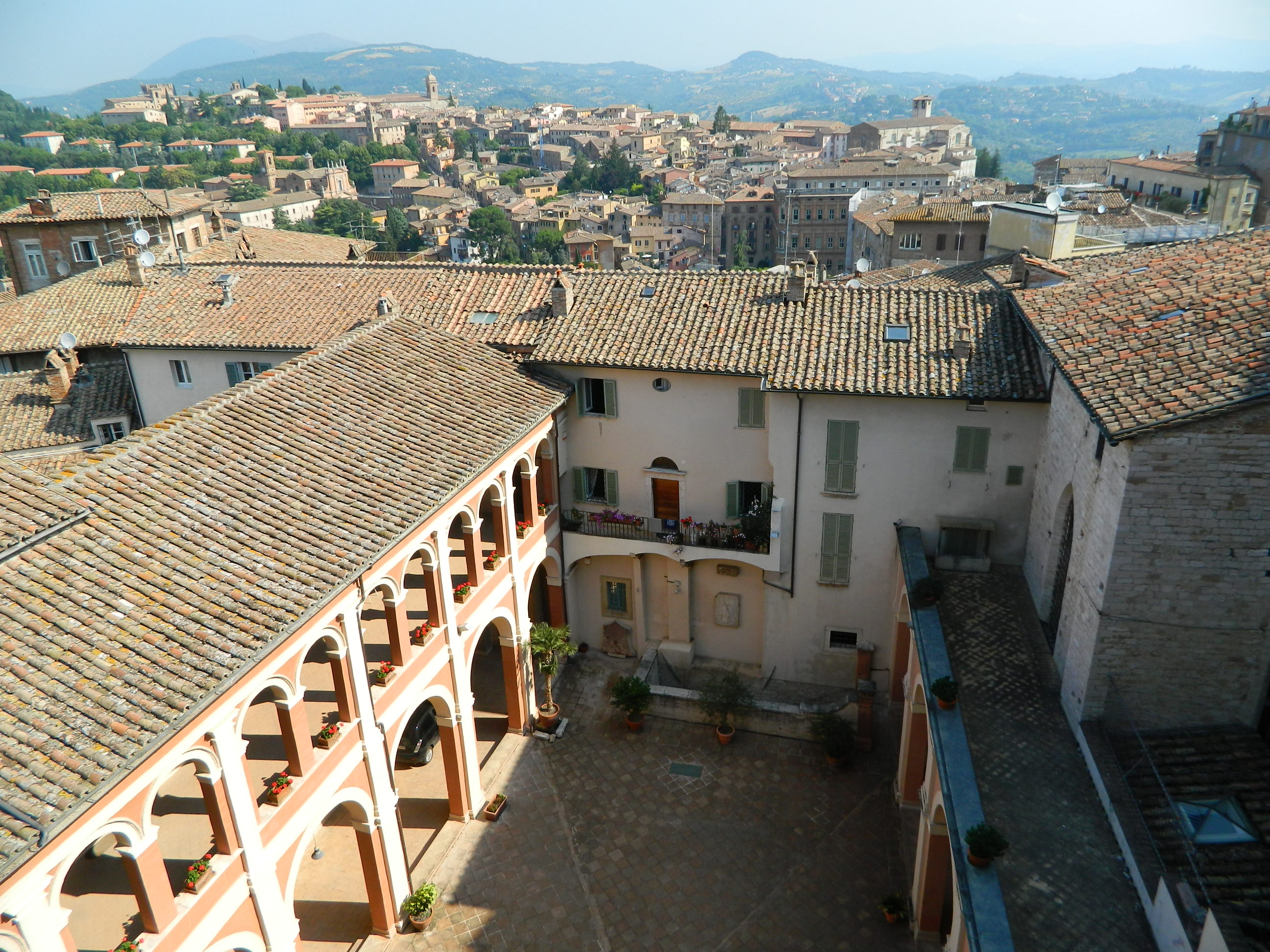 Chiostro San Lorenzo all'interno del Palazzo del Seminario